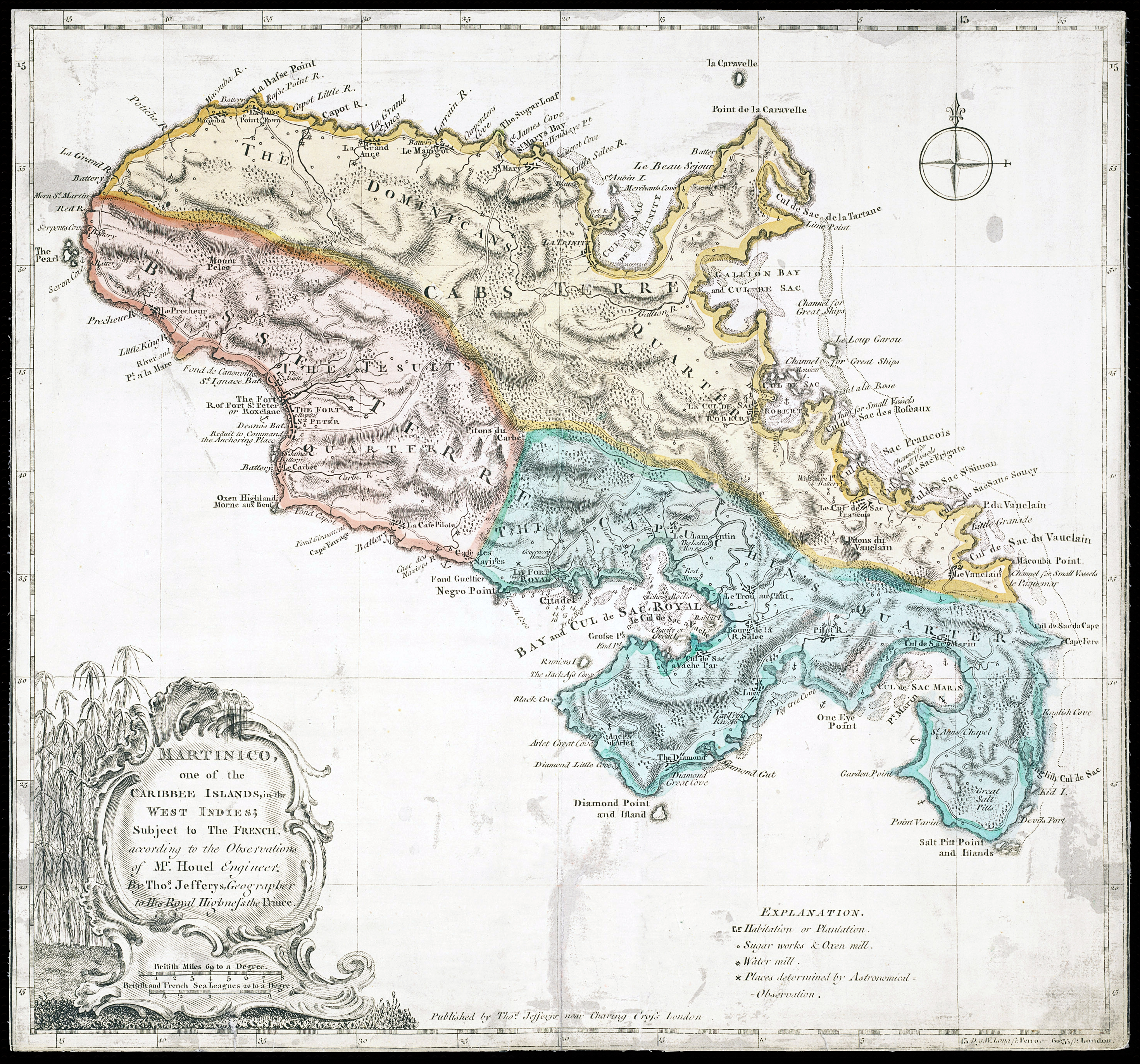 Martinique